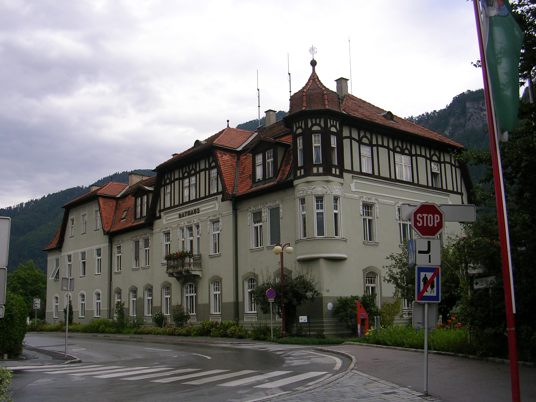 Das Rathaus (ehemaliges Sanatorium) in der Brucker Straße 2 in Frohnleiten (Bezirk Graz-Umgebung).